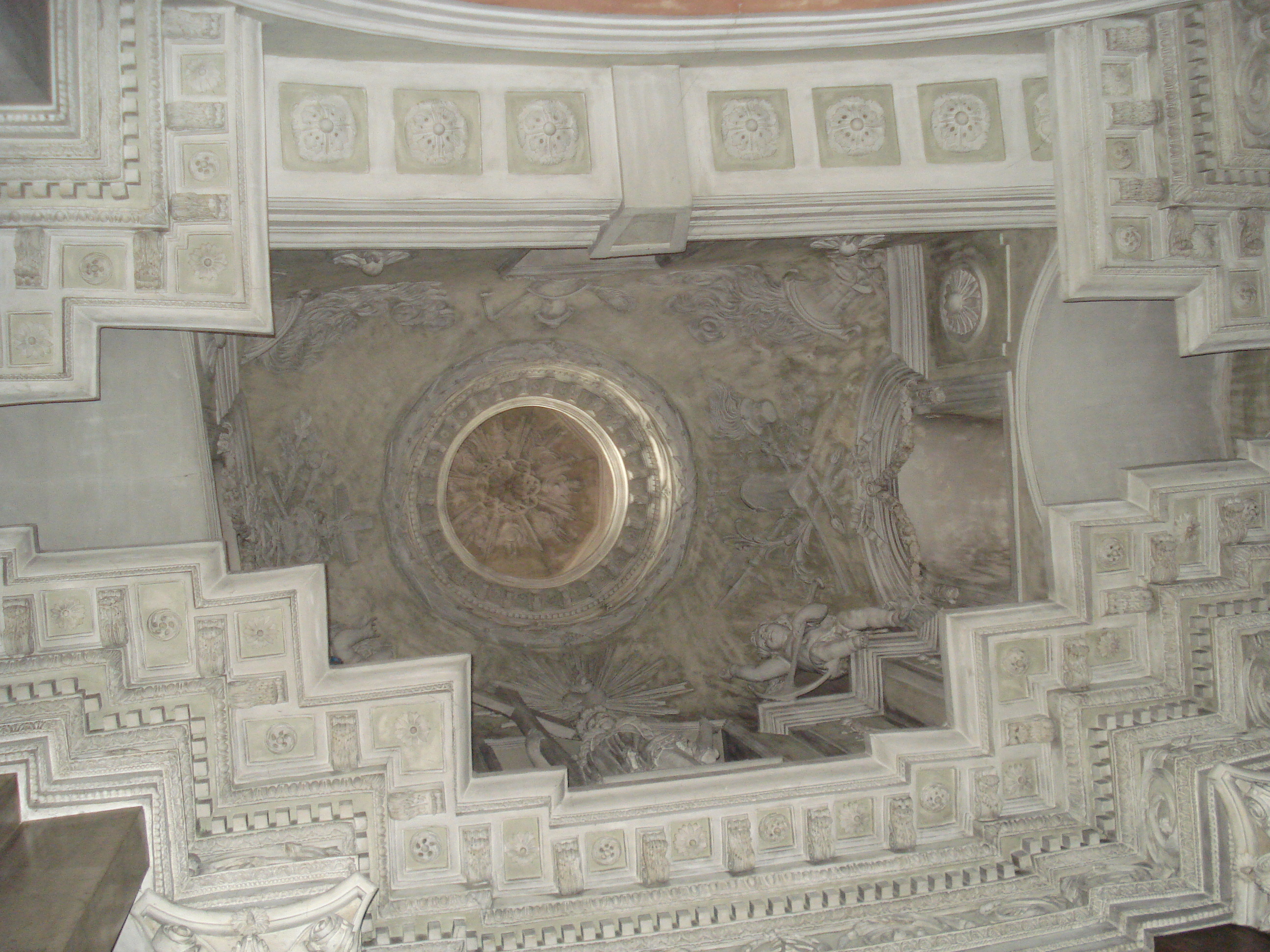 Cappella by Pociej Family of the Church of St. Teresa in Vilnius (kaplica-mauzoleum Pociejów kościołu św. Teresy, wybudowana w 1783). Aušros Vartų g. 14